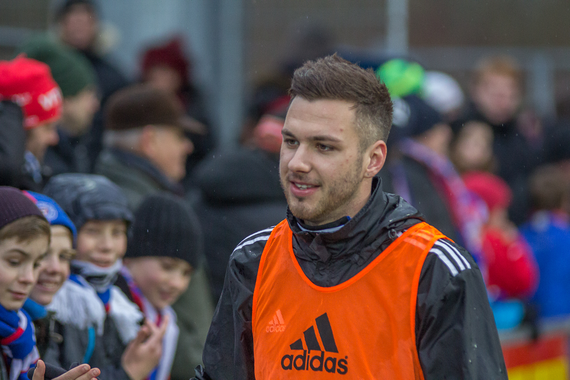 Kevin Schulze